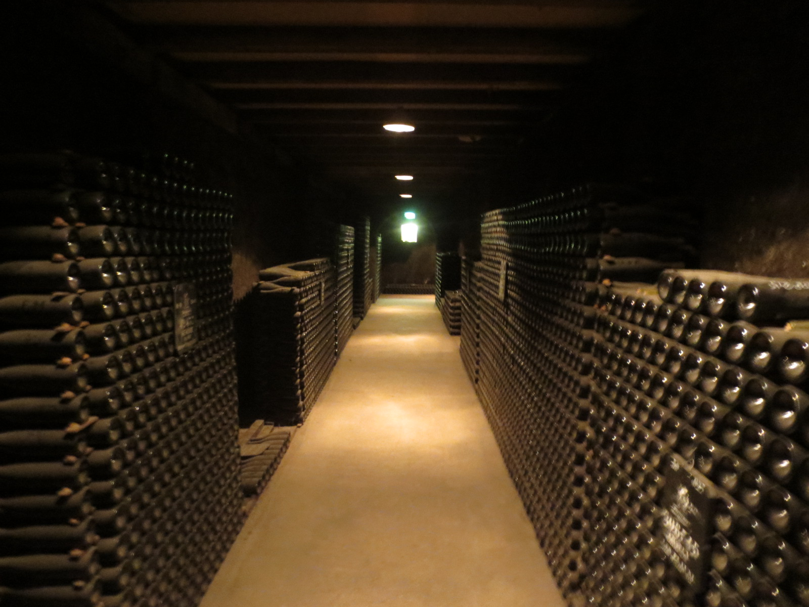 Patriarche (Beaune)